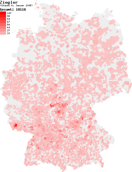 Verteilung des Nachnamens Ziegler in Deutschland nach dem Telefonbuch mit Stand vom 6. Januar 2005